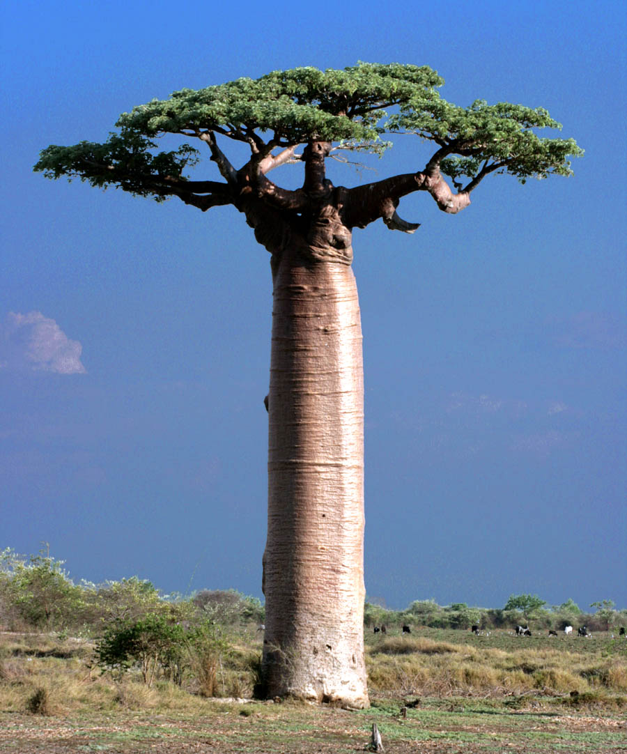 An Adansonia grandidieri (giant baobab) at Morondava, Madagascar